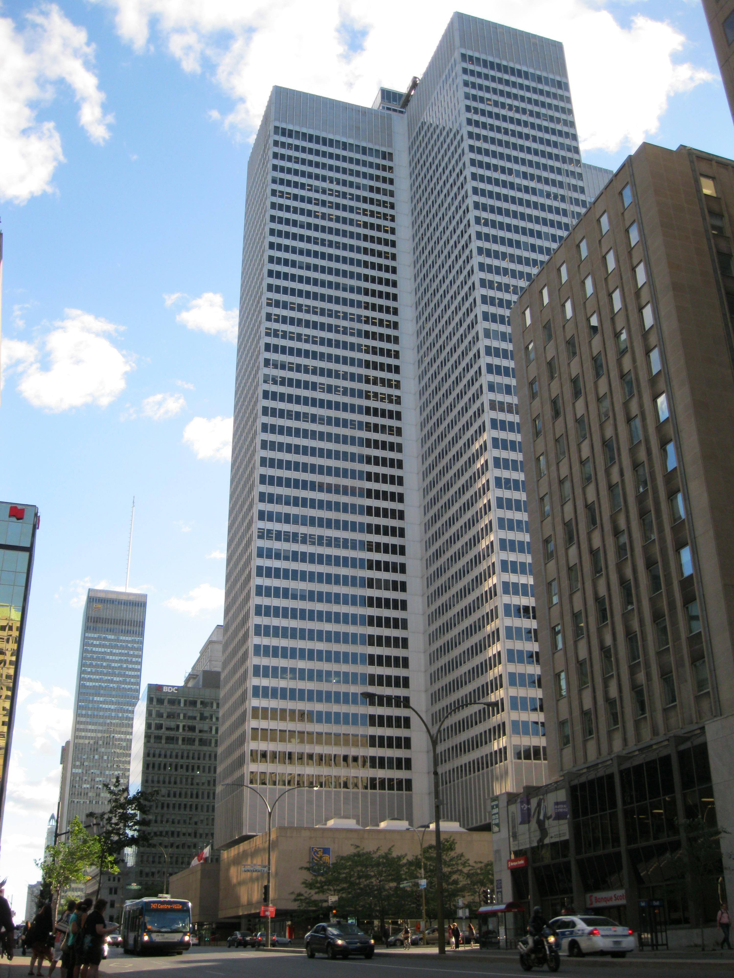 Place Ville Marie, Montréal